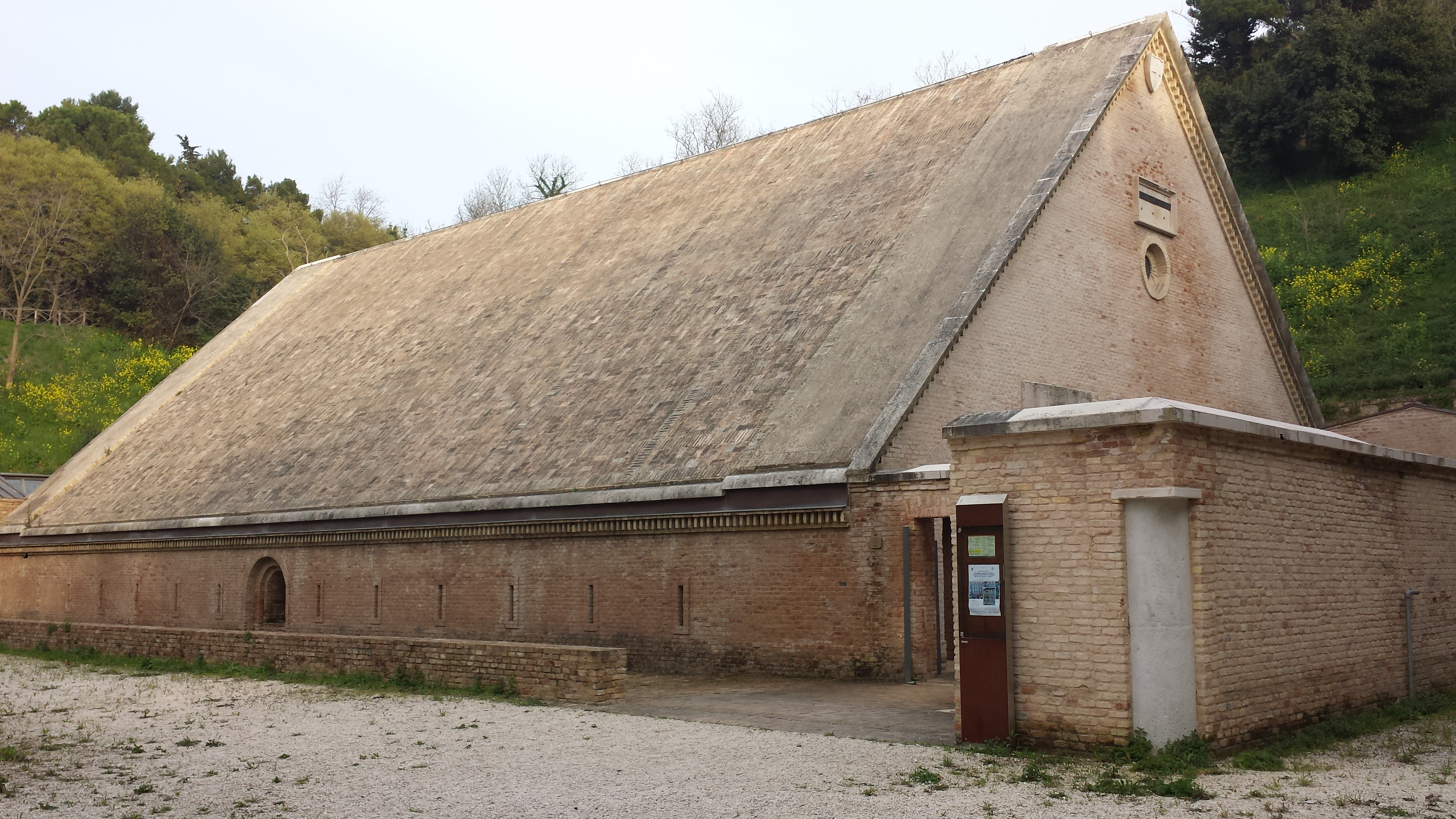 Esterno della polveriera Castelfidardo, ad Ancona